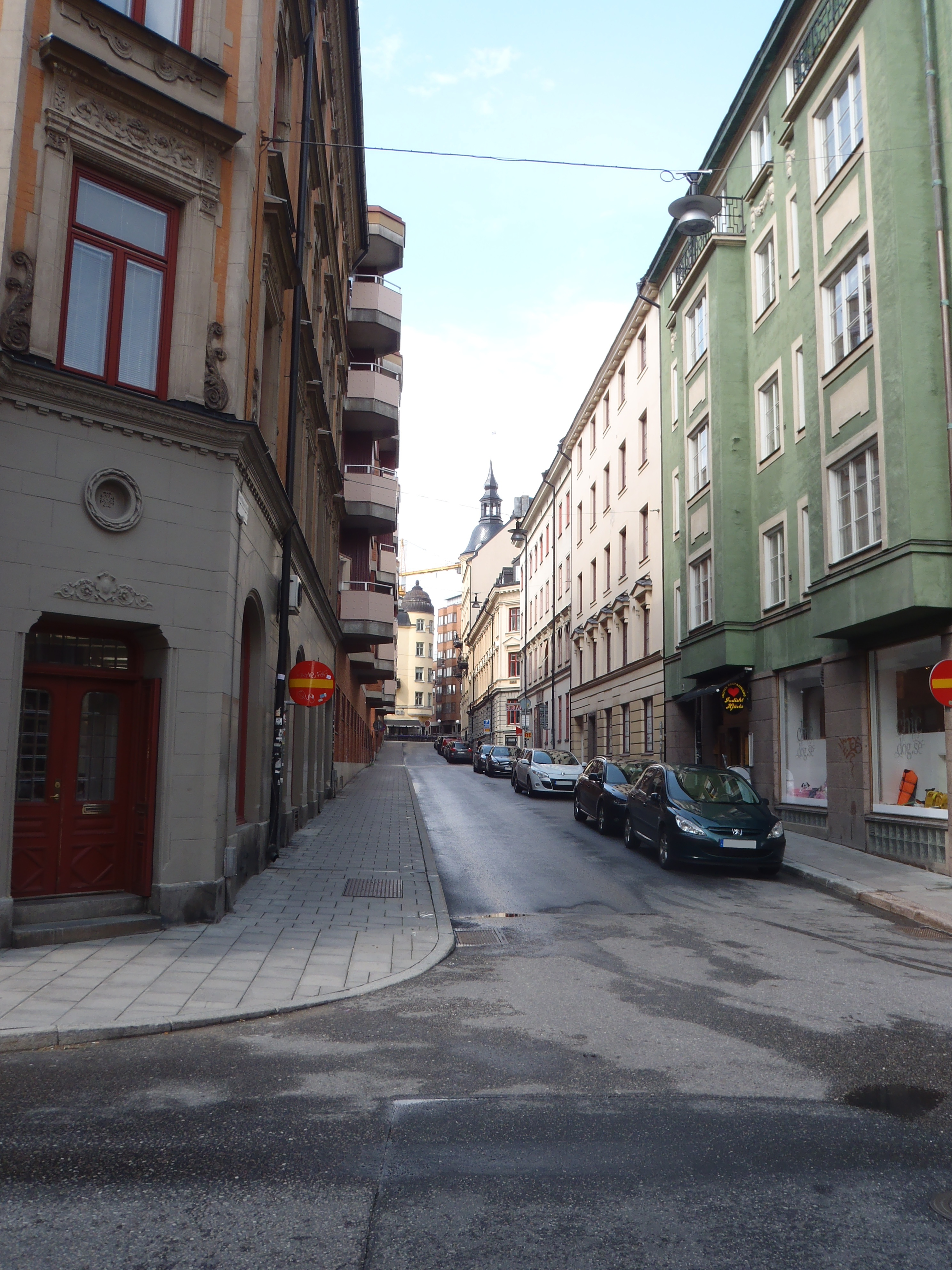 David Bagares Gata ved krydset til Regeringsgatan med kig i retning mod vest. Stockholm.